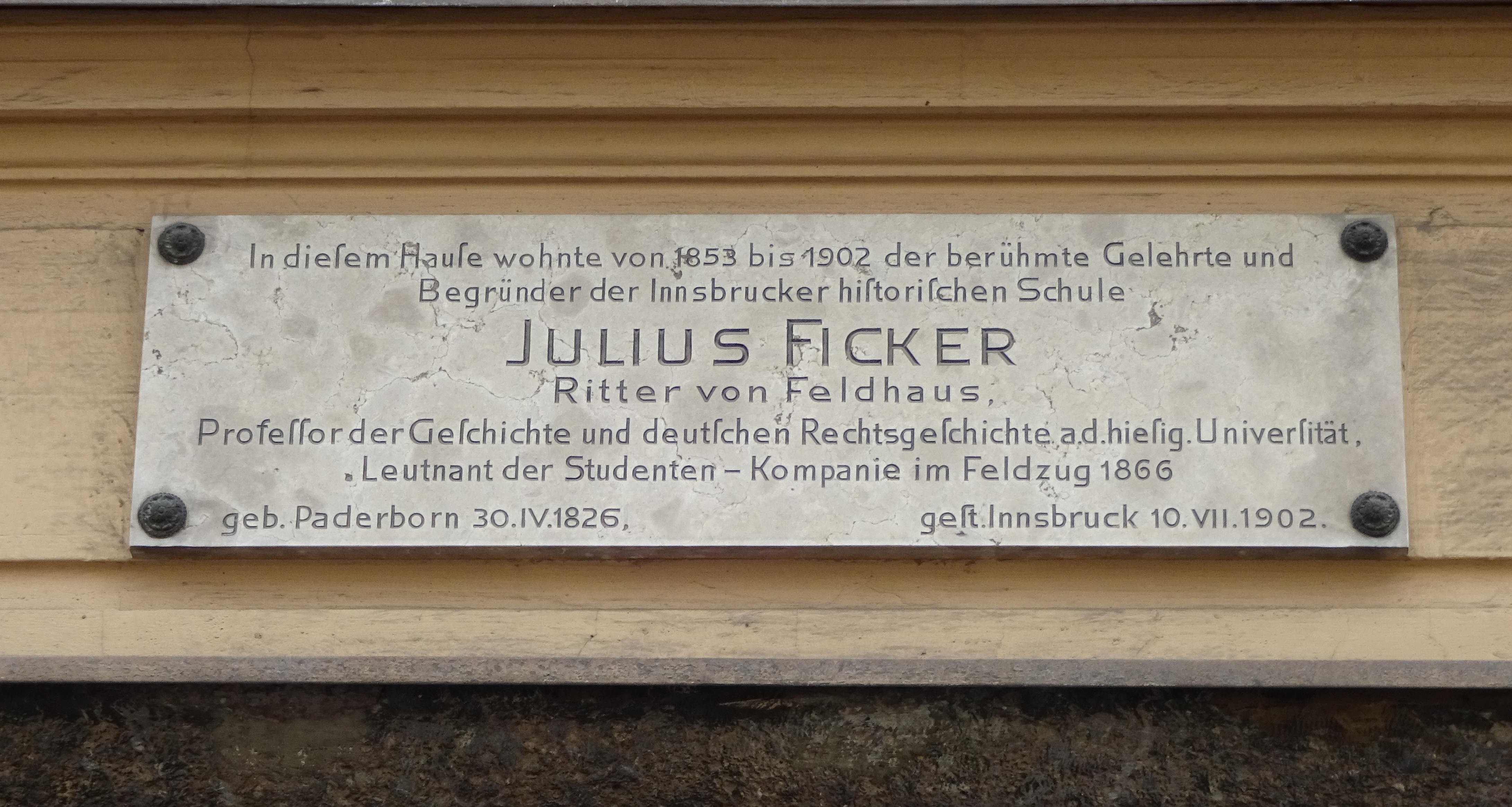 Steidlevilla, Leopoldstraße 22, Innsbruck-Wilten: Gedenktafel für Julius Ficker über dem Portal